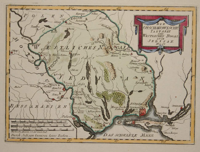 Die Otschakowische Tartarey oder Westliches Nogaj, auch Jedisan. Nro. 12. Kolorierter Kupferstich, ca. 20,5 × 28 cm